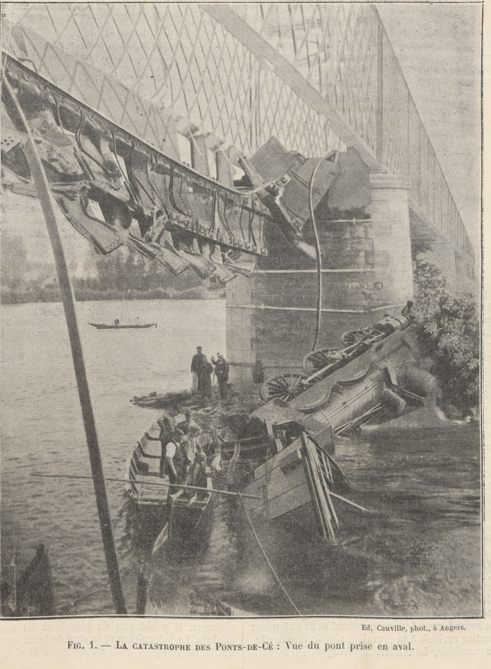 Catastrophe des Ponts-de-Cé du 4 août 1907: photo du pont et du train tombé dans la Loire publiée dans la revue Le Génie civil du 14 septembre 1907.